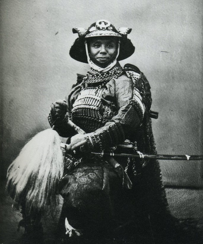 河津祐邦の肖像写真(パリにて撮影)。